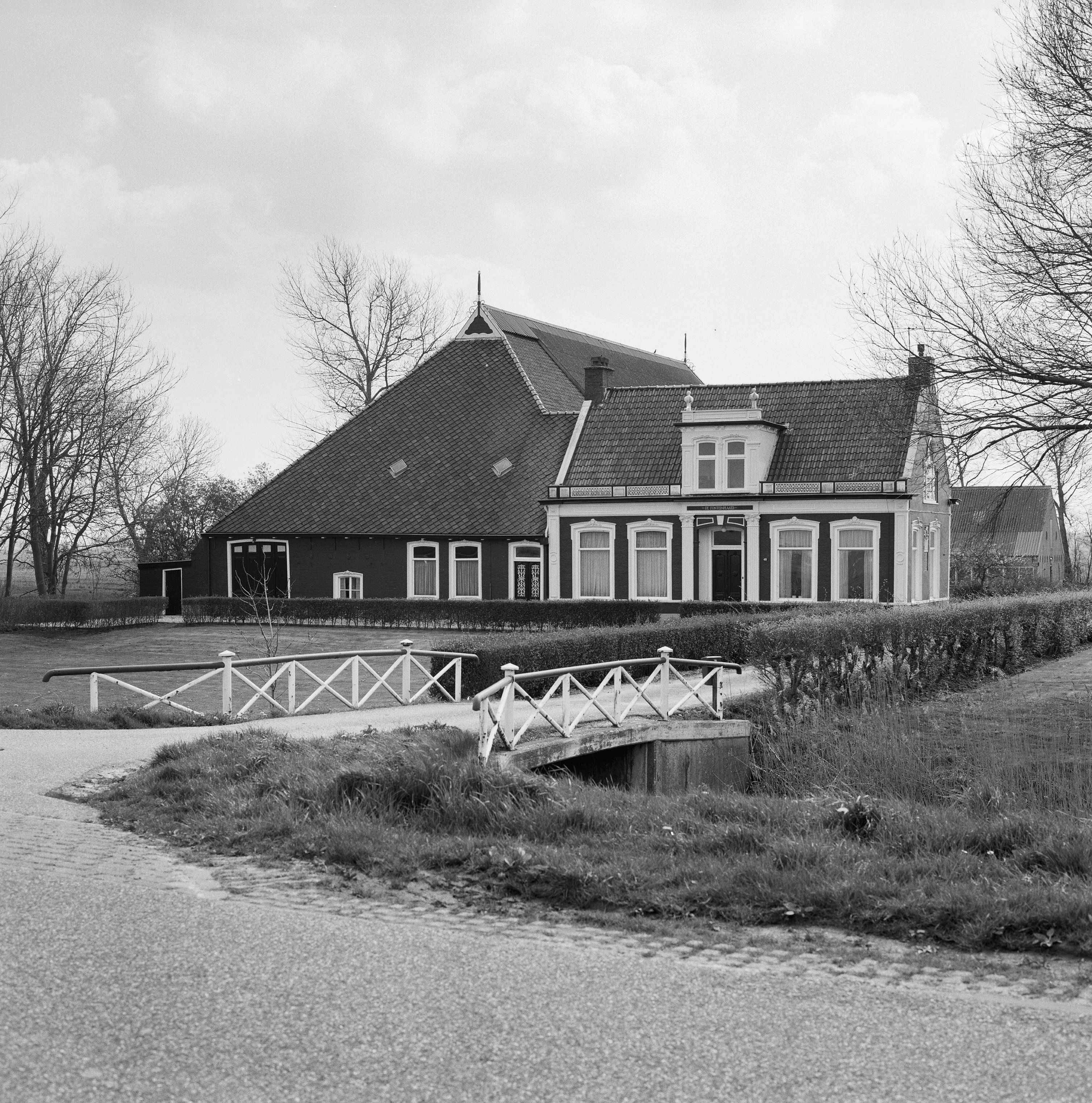 Fonteinplaats: Overzicht voorgevel en rechter zijgevel boerderij met stal (opmerking: Gefotografeerd voor Monumenten In Nederland Friesland, bladzijde 270)